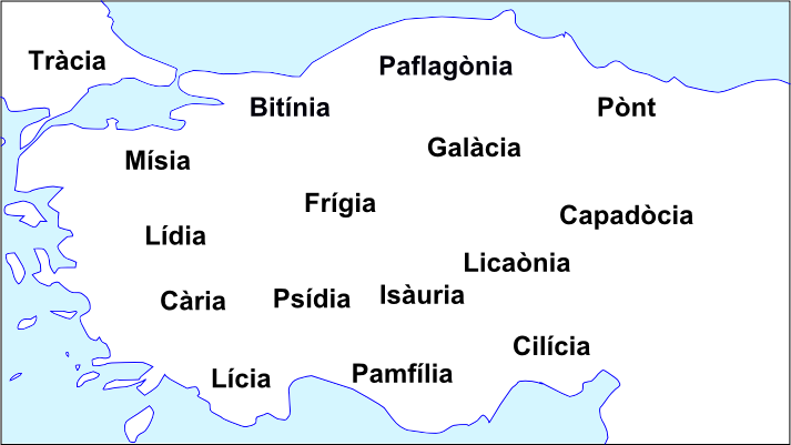 Regions istoricas d'Anatolia.